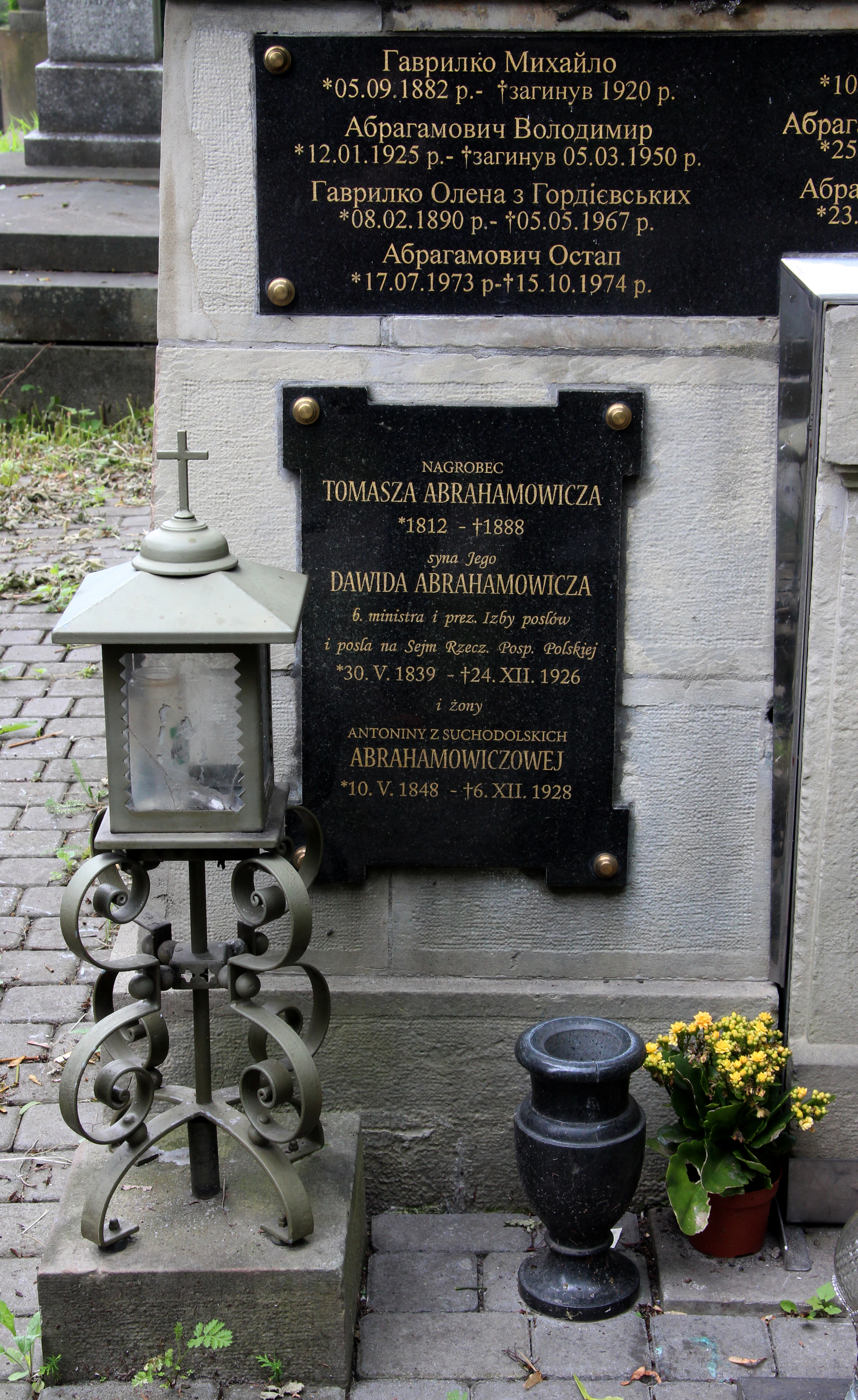 Гробівець Абрагамовичів (табличка зі списком)